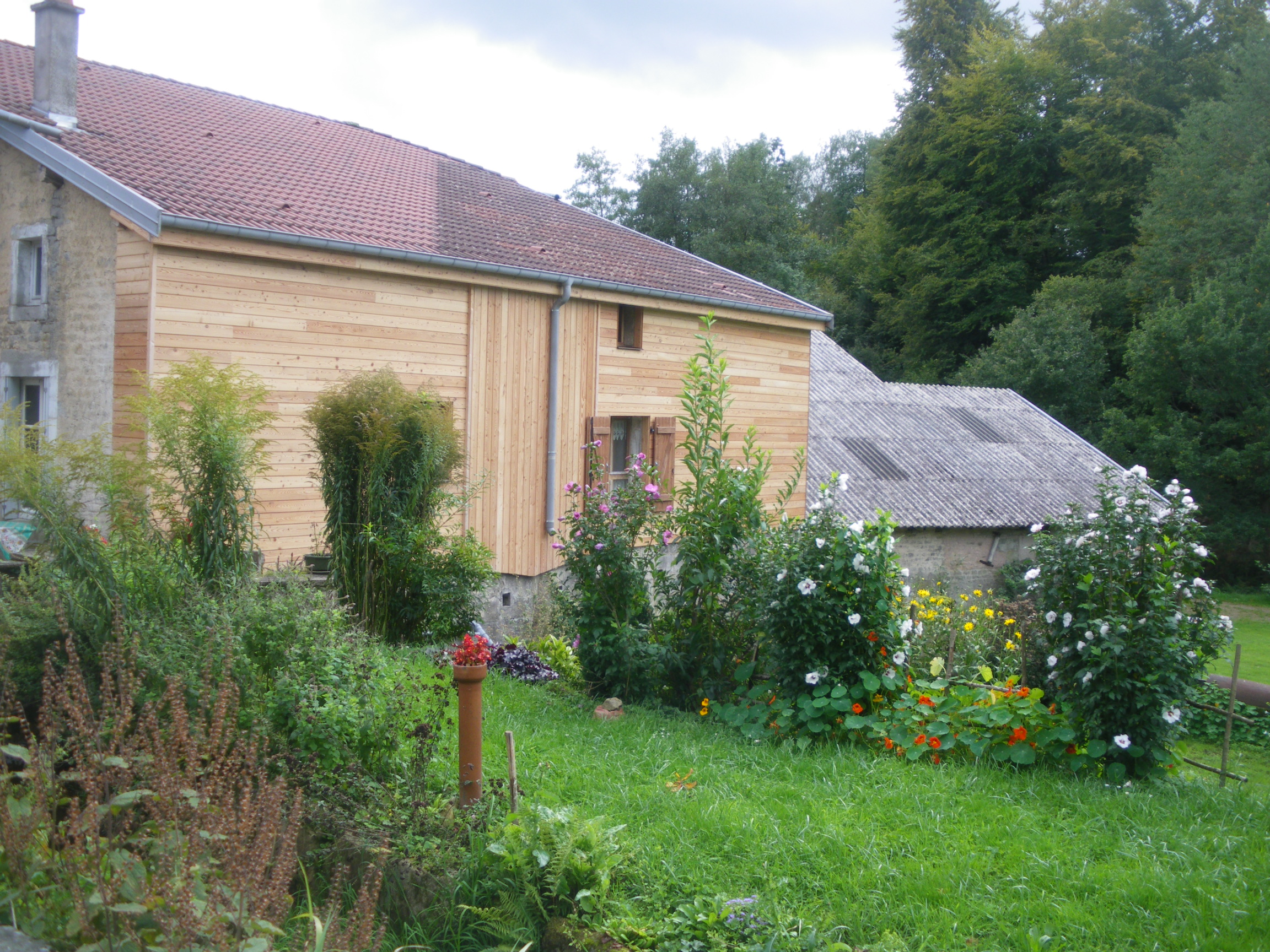 Moulin Gentrey à Harsault, Vosges, féculerie musée